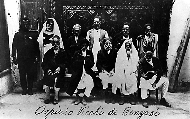 בנגאזי,בית אבות יהודי, 1920